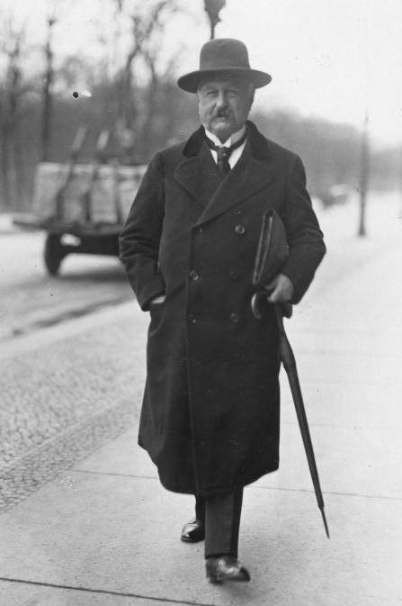 Dr. Constantin Fehrenbach Der frühere Reichskanzler Fehrenbach auf dem Wege zu einer Reichstagssitzung. [Berlin.- Ex-Reichskanzler Dr. Constantin Fehrenbach] Abgebildete Personen: Fehrenbach, Constantin Dr.: Reichskanzler, Zentrum, Deutschland